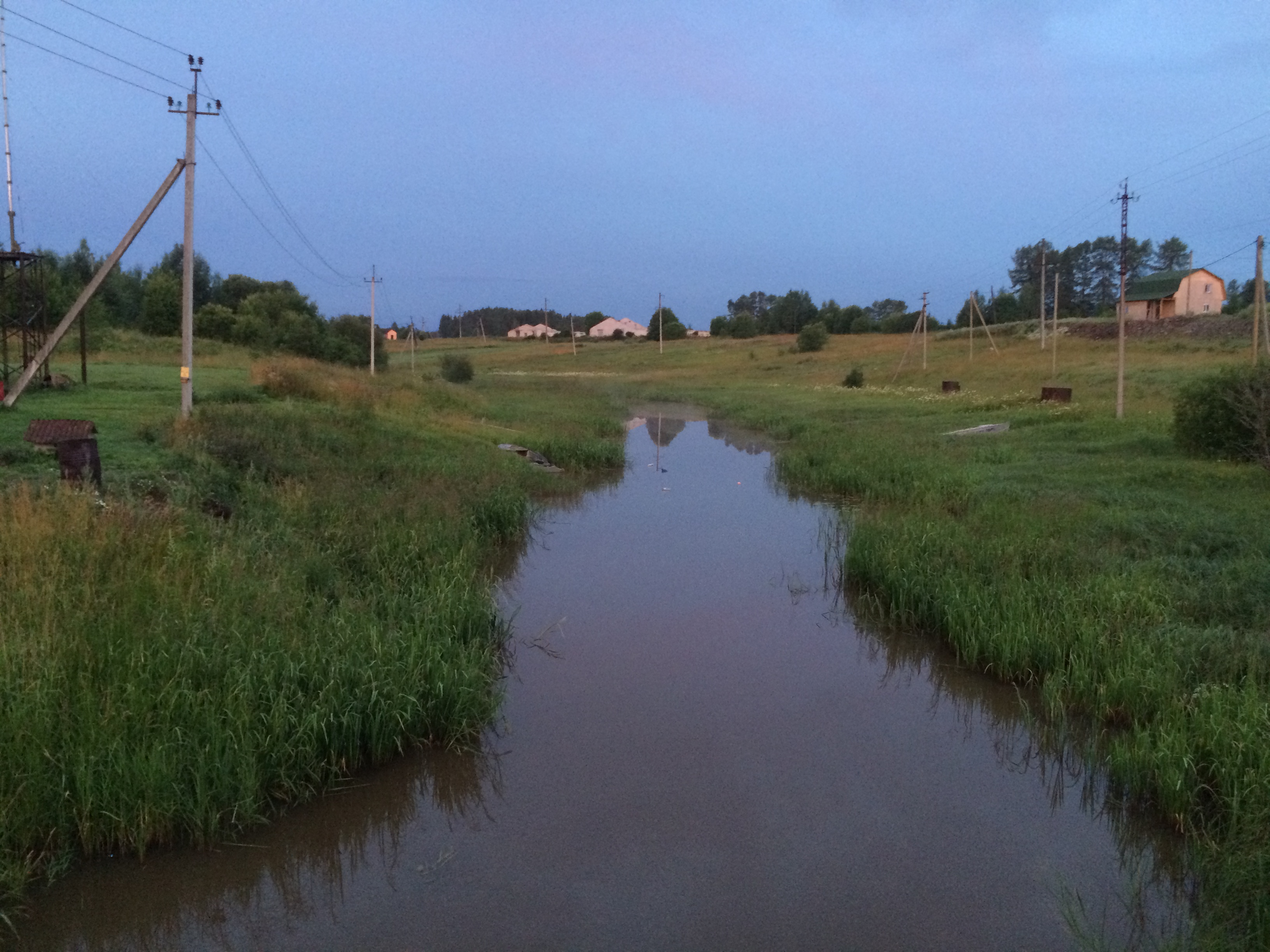 Савийоки